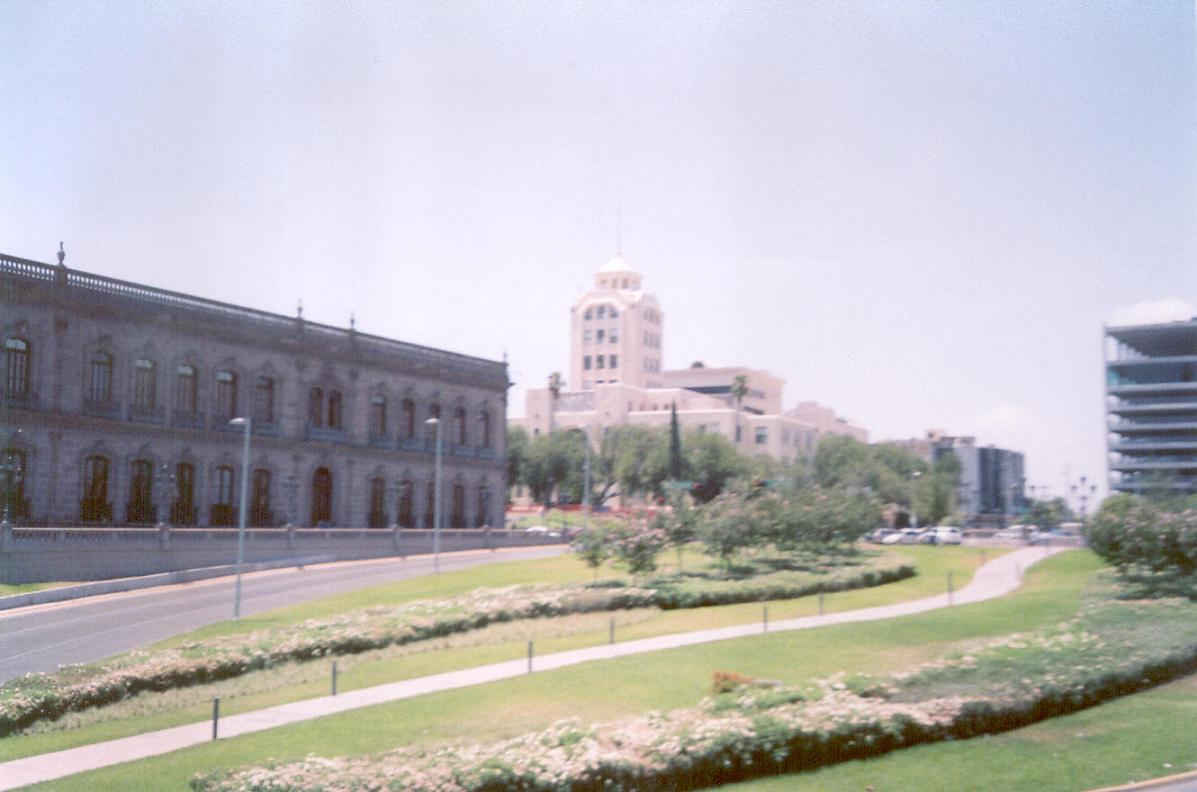 Vista del Palacio federal de correo y telégrafos de Nuevo León